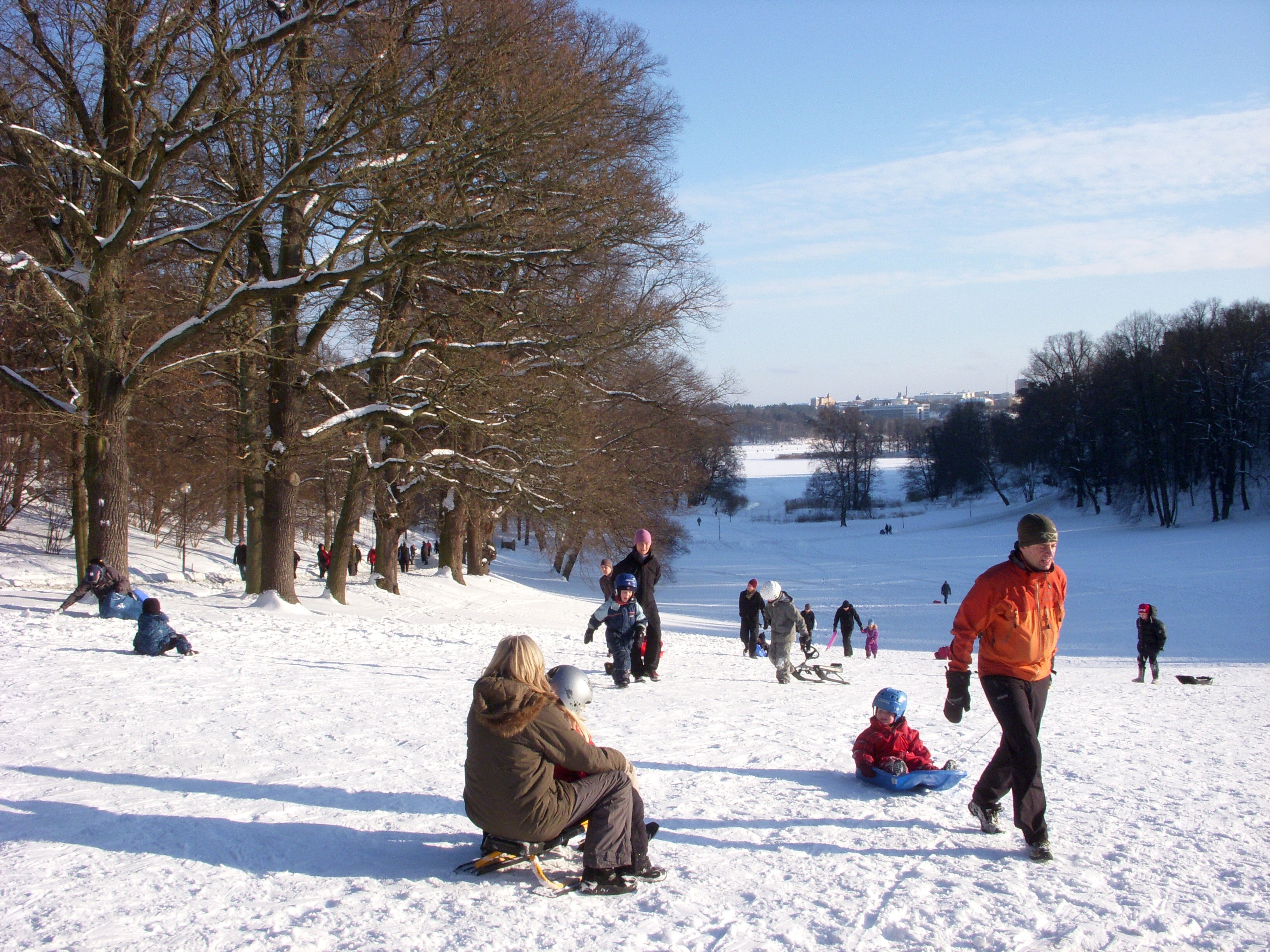 Pelousen i Hagaparken på vintern